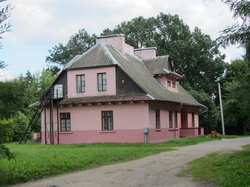 Бердаўка. Дом дырэктара конезавода